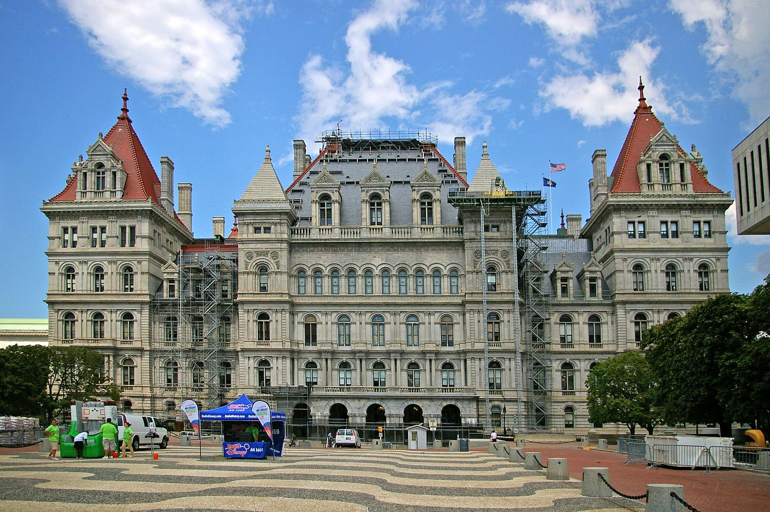 New York State Capitol in Albany